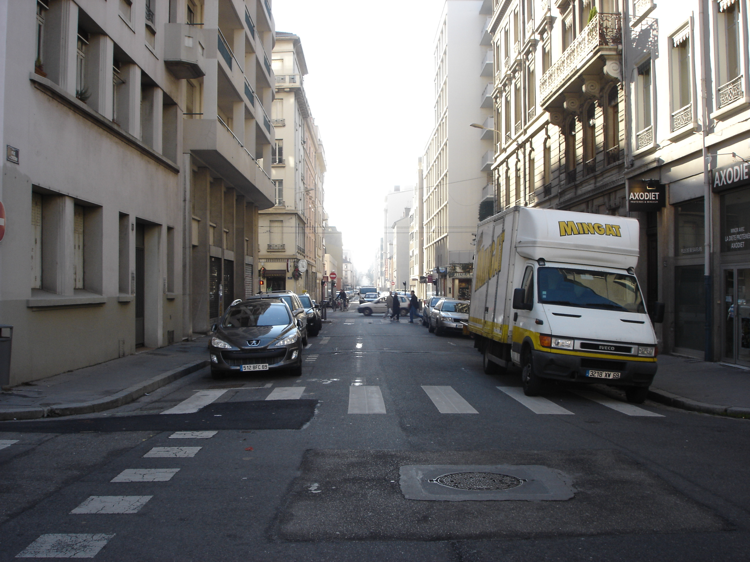 La rue de Créqui juste au nord du cours Lafayette